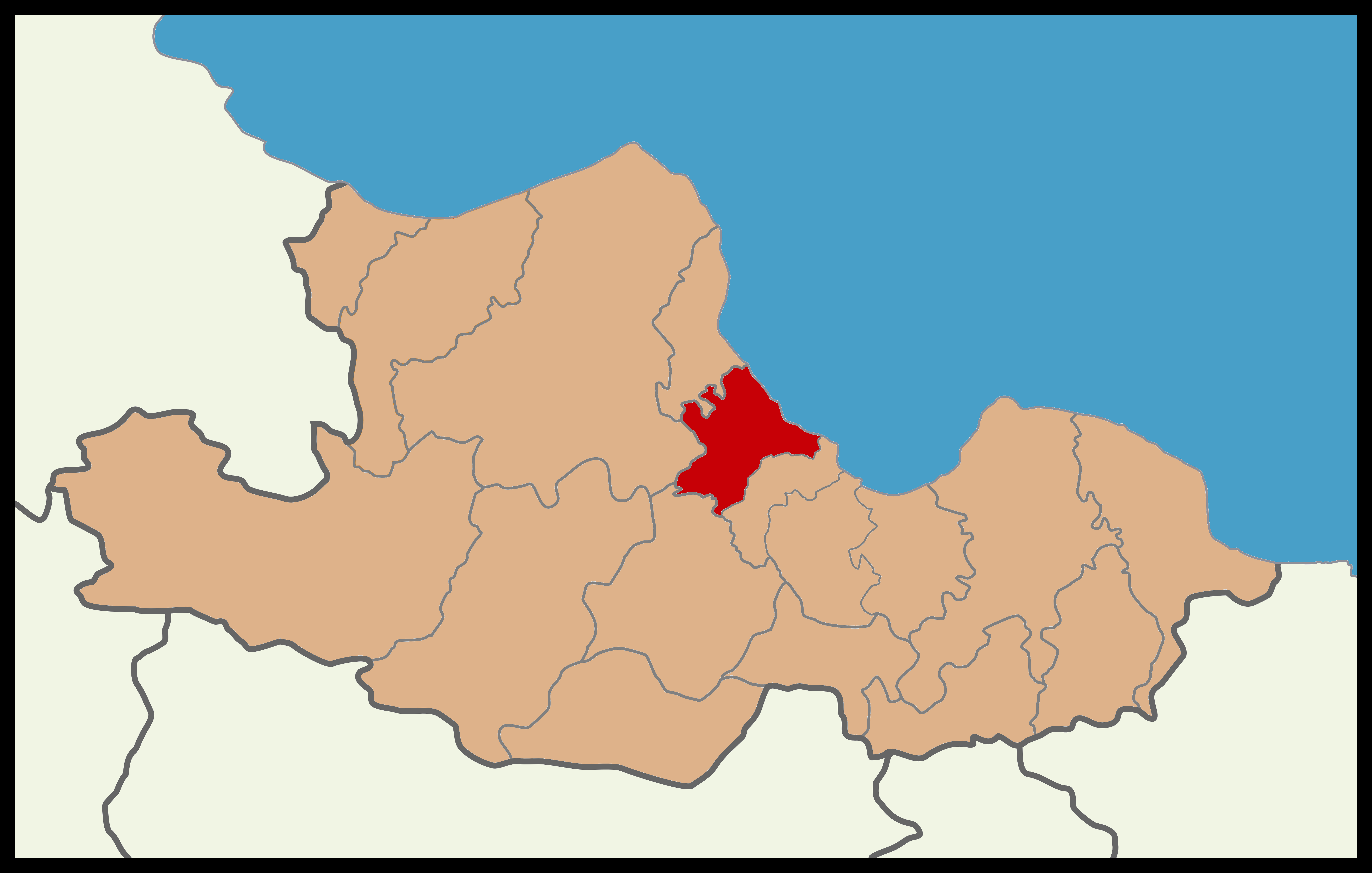 Samsun'un Atakum ilçesinin 2019 Türkiye yerel seçimleri haritası.